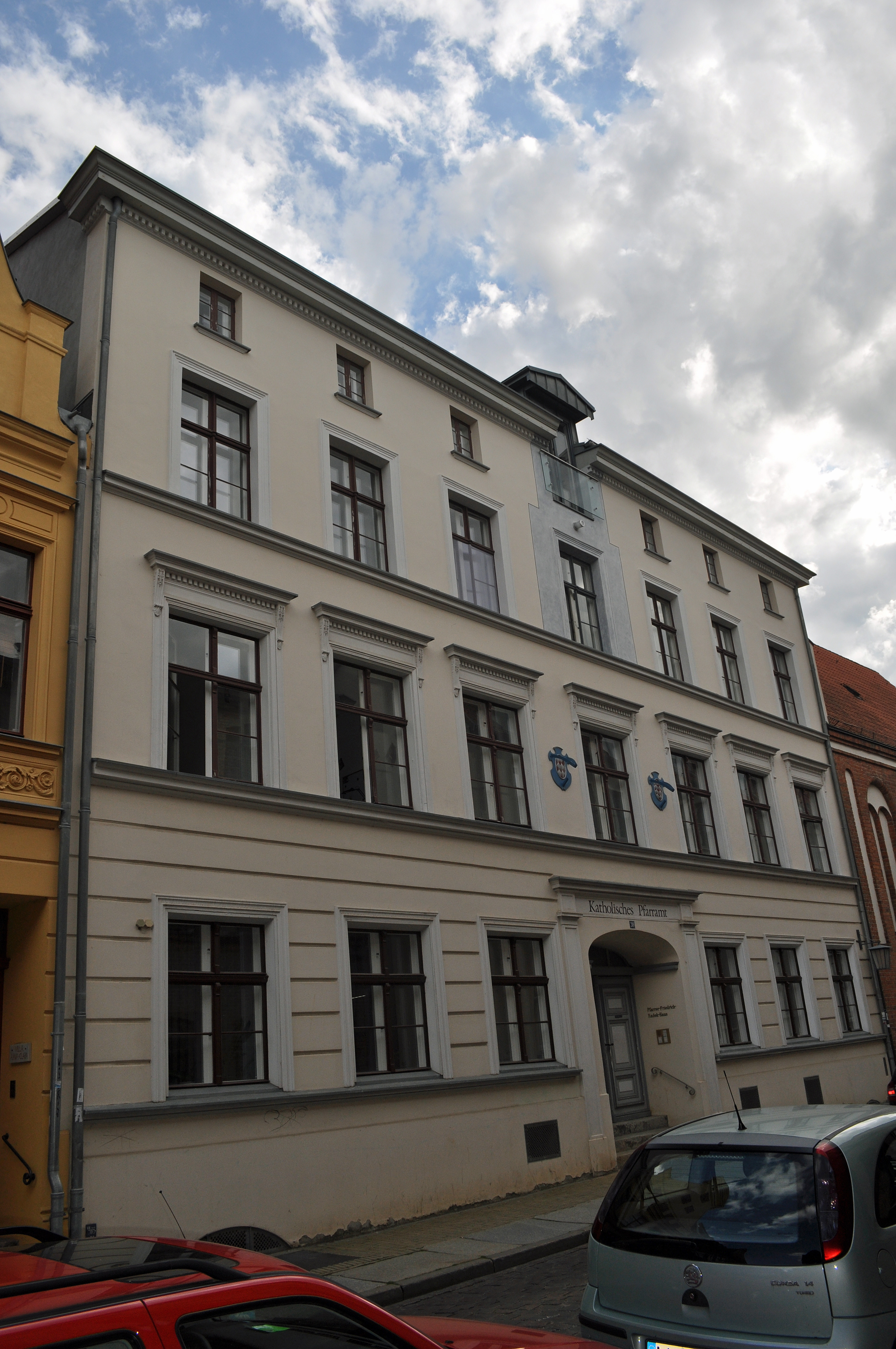 Das Foto zeigt ein Haus (bzw. Details des Hauses) in der Frankenstraße in Stralsund, Deutschland. Die Hausnummer steht im Dateinamen. Aufgenommen am 19. Juli 2011 vom Benutzer:Klugschnacker.